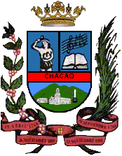 Escudo del municipio Chacao, Caracas, estado Miranda, Venezuela